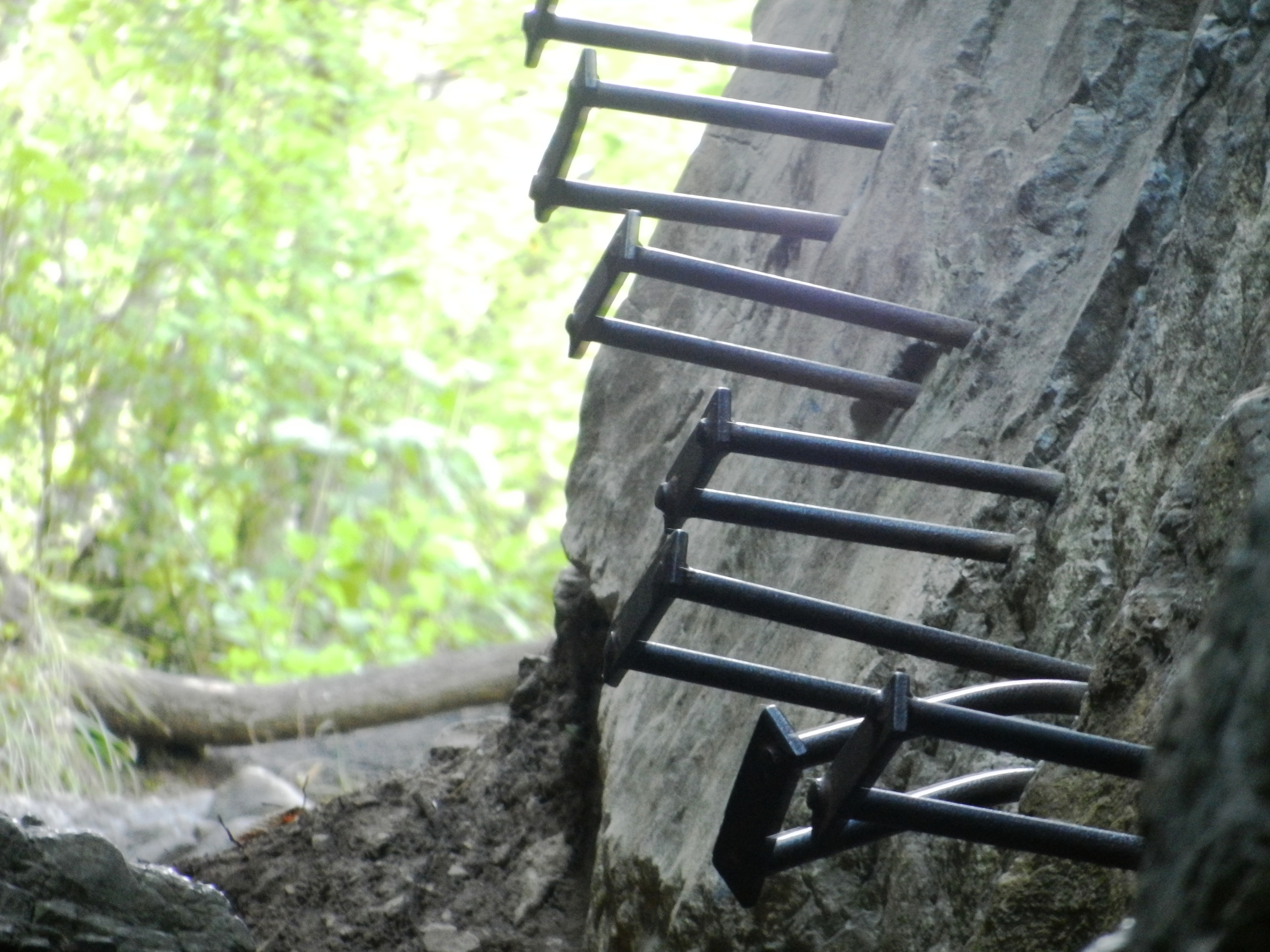 Zelo zahtevna Pogačnikova pot na Grmado (Šmarna gora), Ljubljana